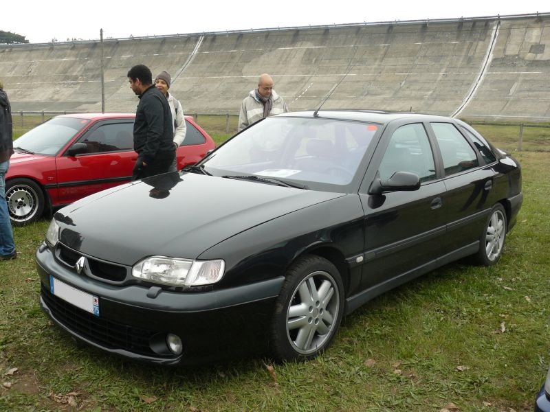 Français cadien: Montlhery Avril 2012